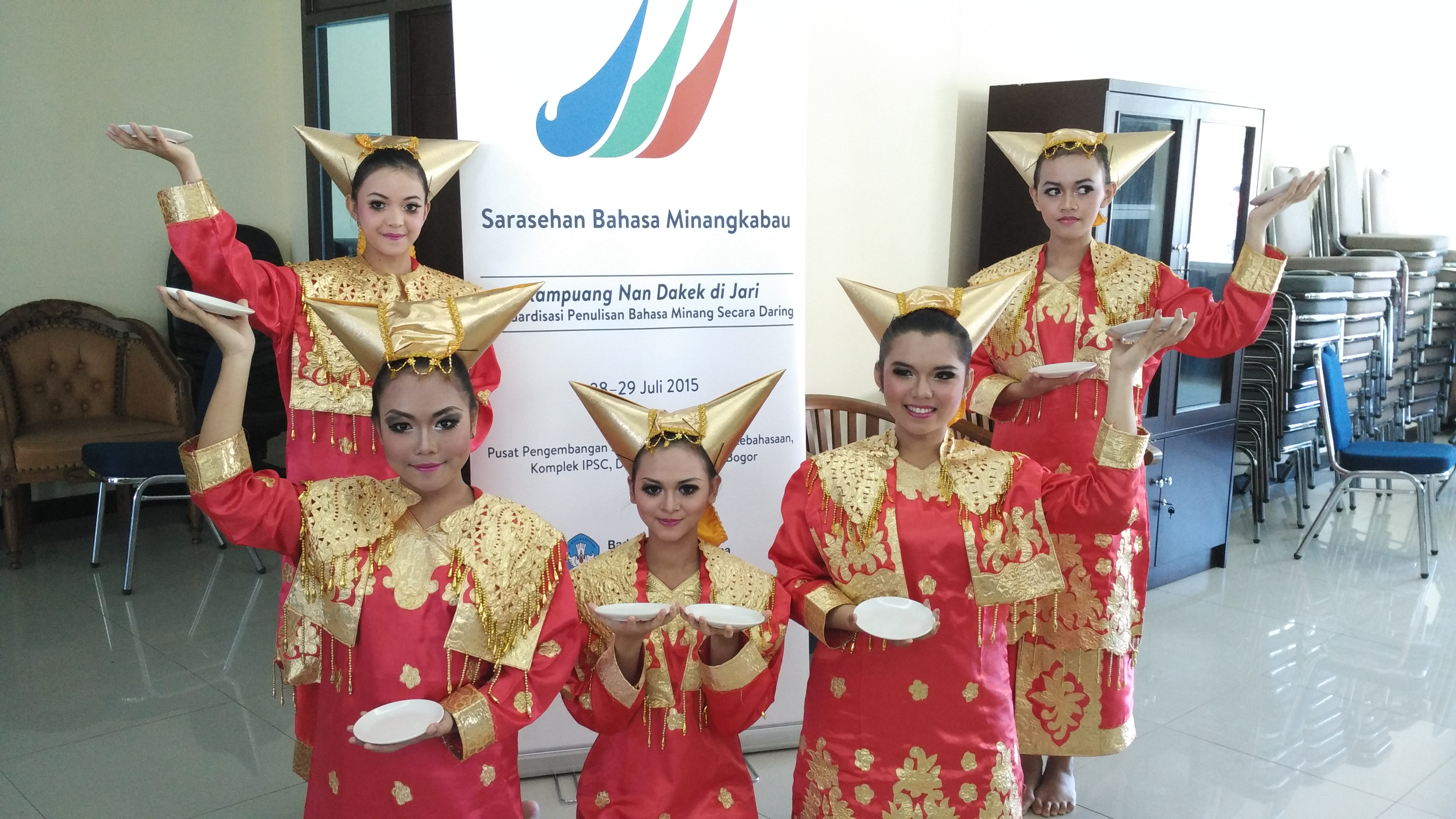 Sekumpulan penari tari piring dari Sanggar Bhinneka Srikandi, Sumatra Barat